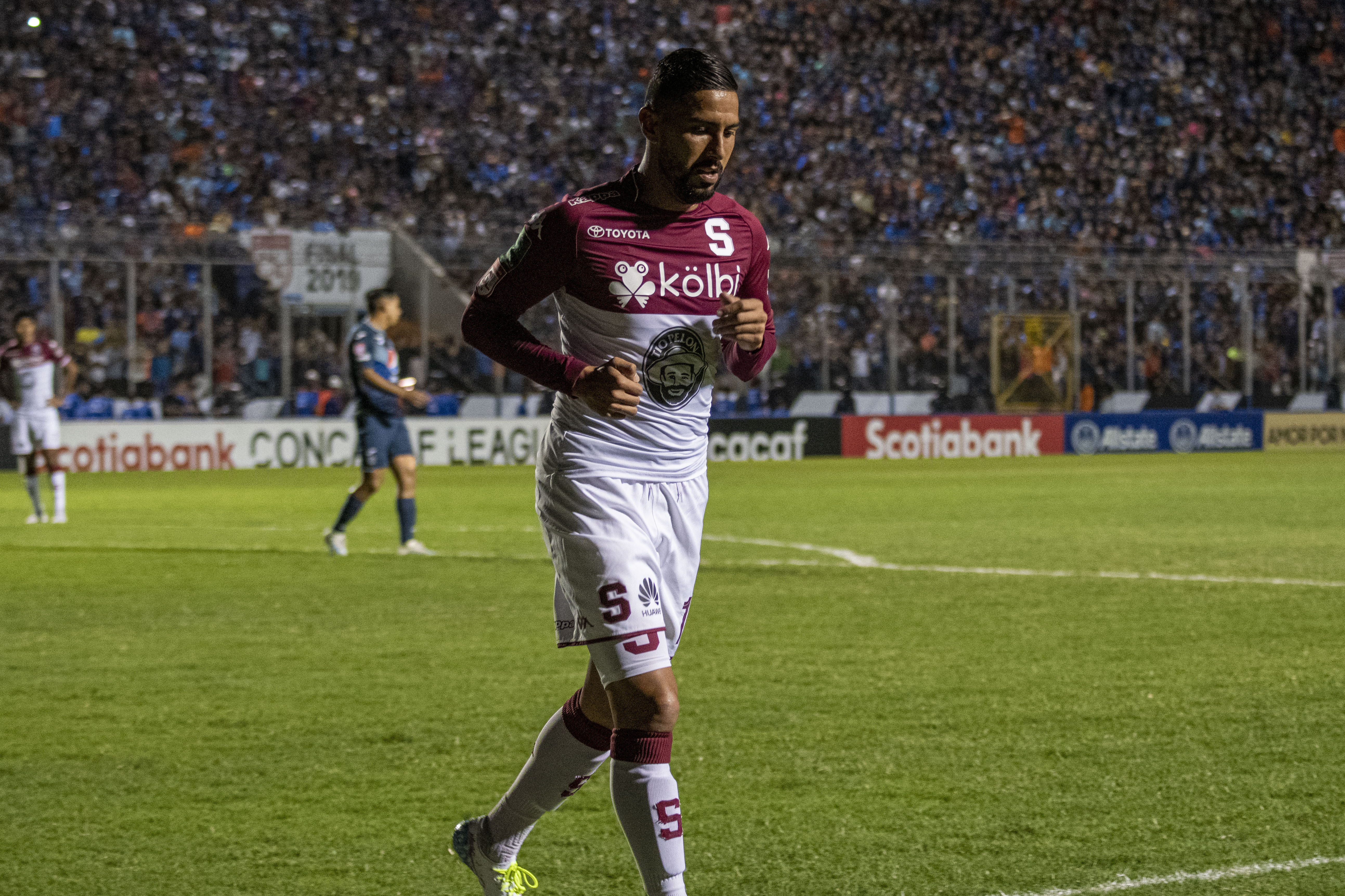 Marvin Angulo camina hacia el vértice para realizar un tiro de esquina en la final de Liga Concacaf 2019.